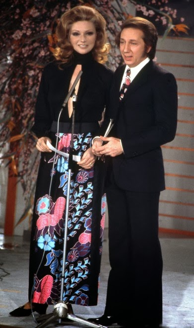 I presentatori del Festival di Sanremo 1972, Sylva Koscina e Mike Bongiorno